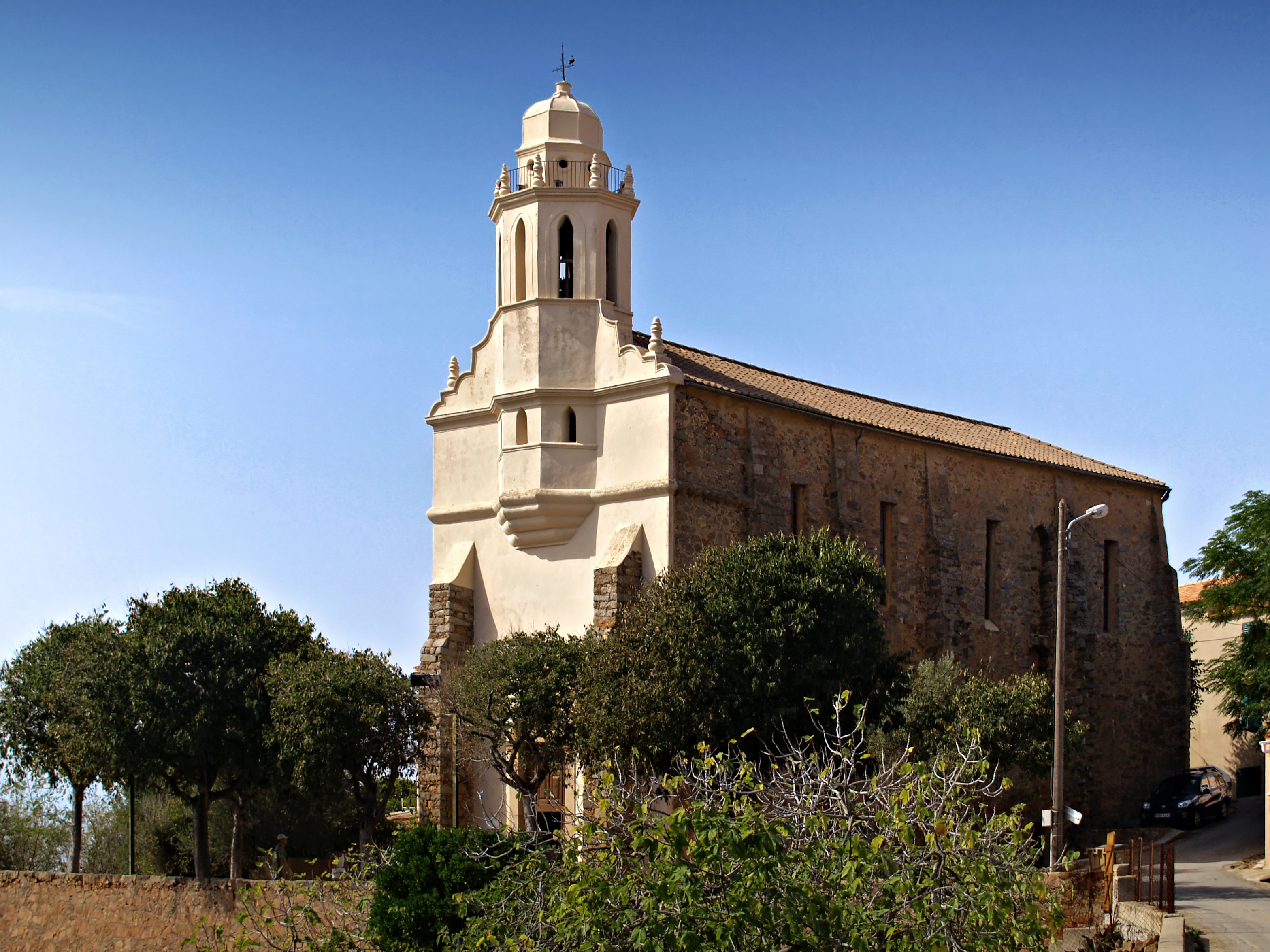 Cargèse (Corse) - Église Saint-Spiridon dite la Grecque MH